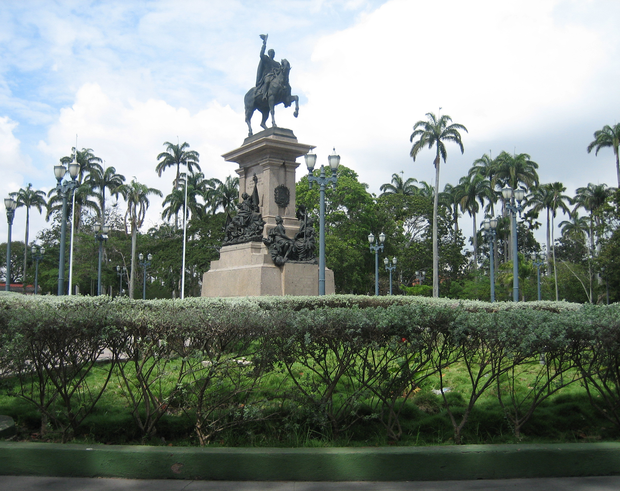 Parque Ayacucho à Barquisimeto Photo: M. Gonzalez